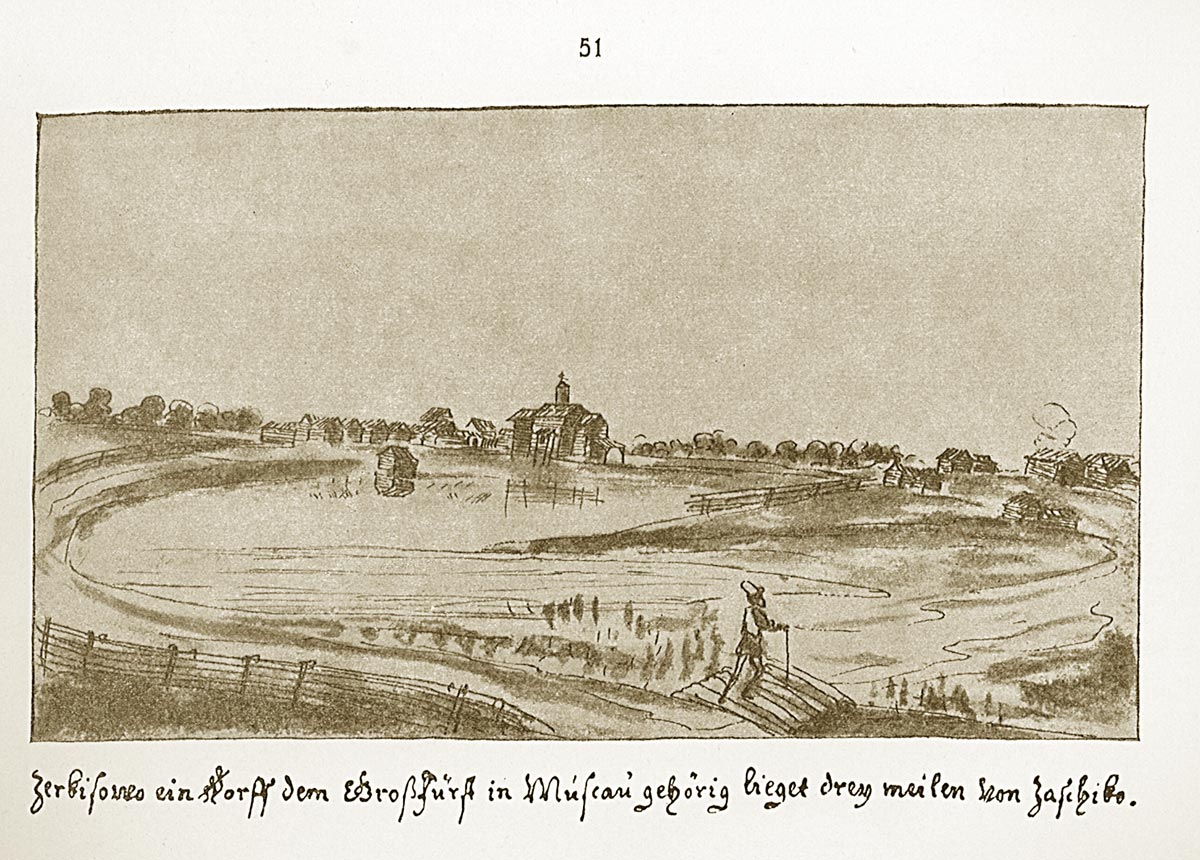 Черкизово